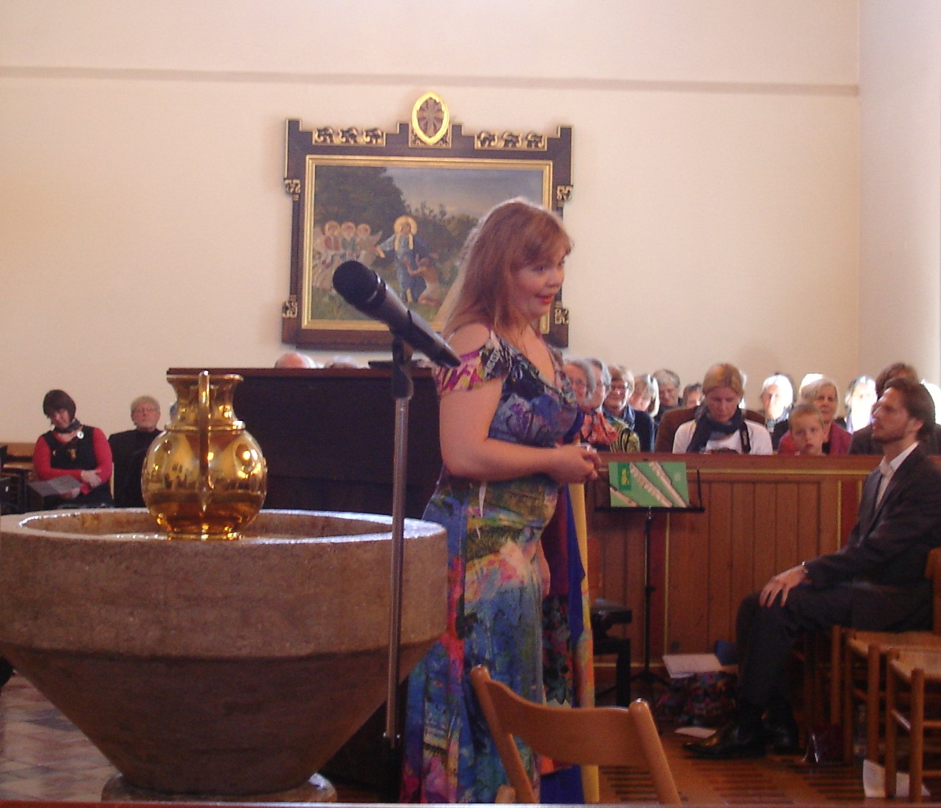 Ingeborg Børch ved æreskunstnerkoncerten i Østermarie Kirke 2014